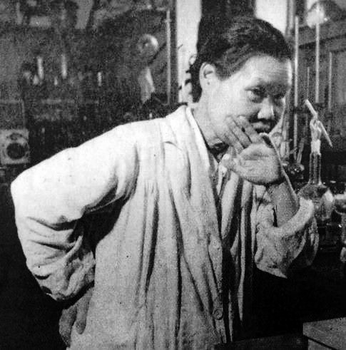 辻村ミチヨ（農学者）